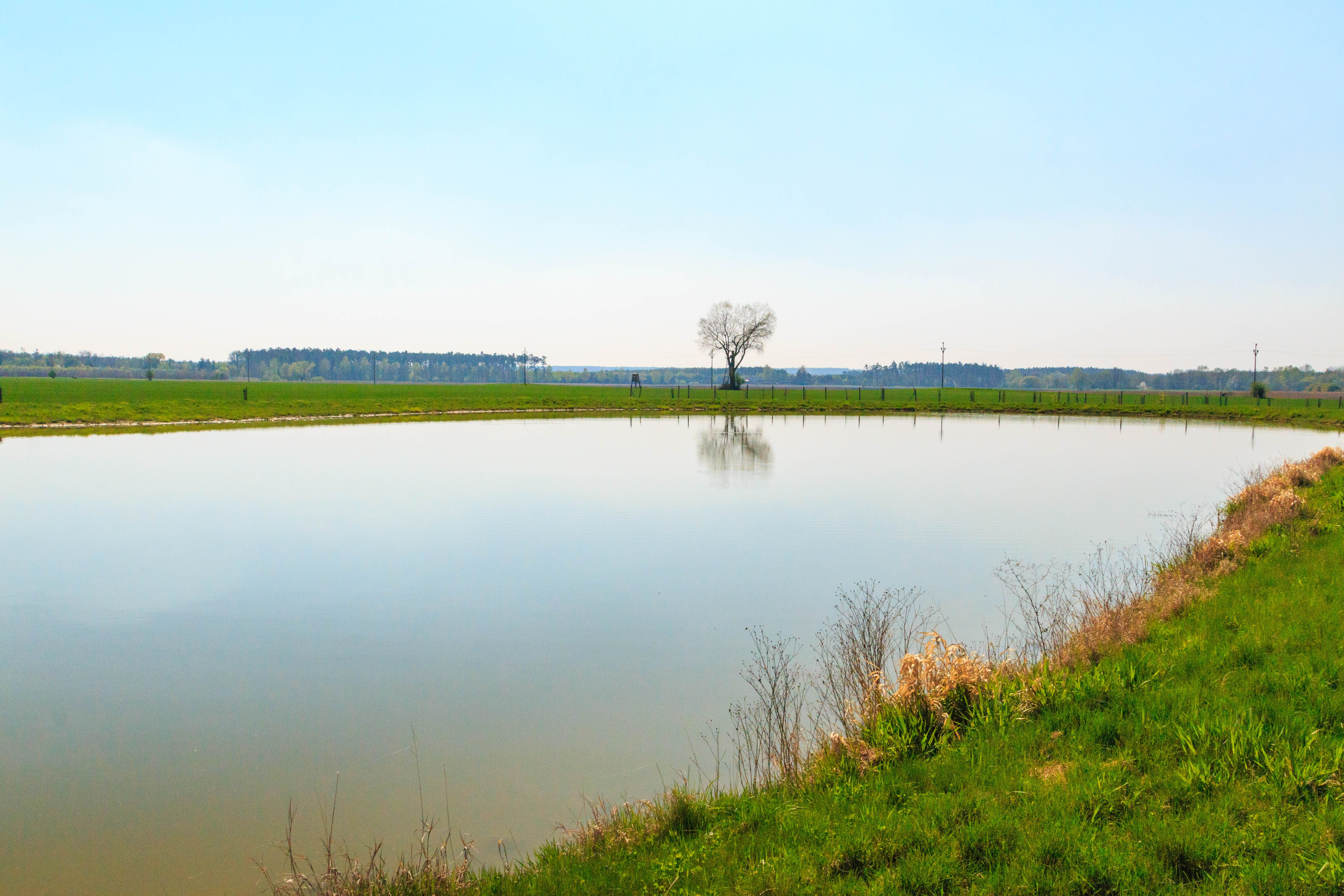 Na Ohrádkách - revitalizace lokality Project: Vodstvo